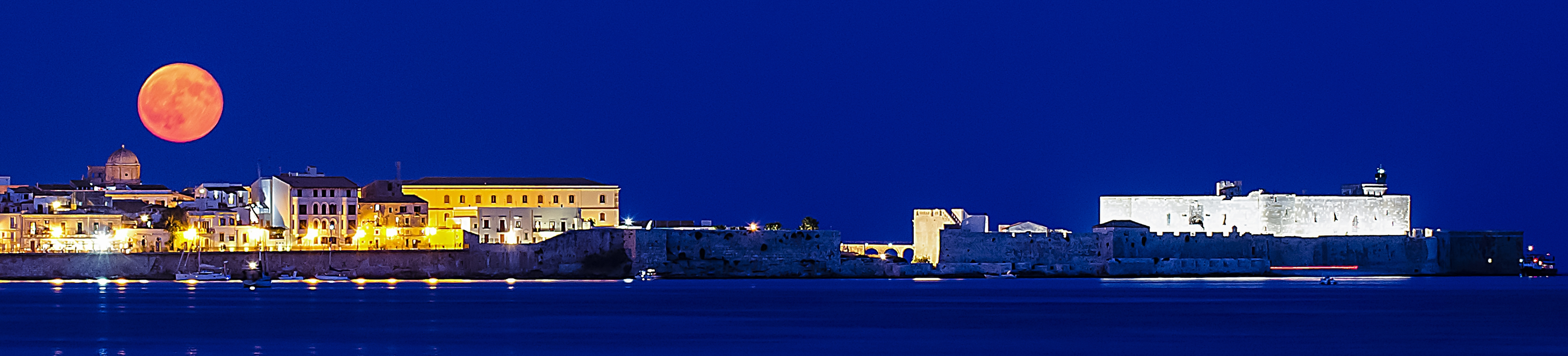 Luna rossa a Ortigia (Siracusa, Sicilia)